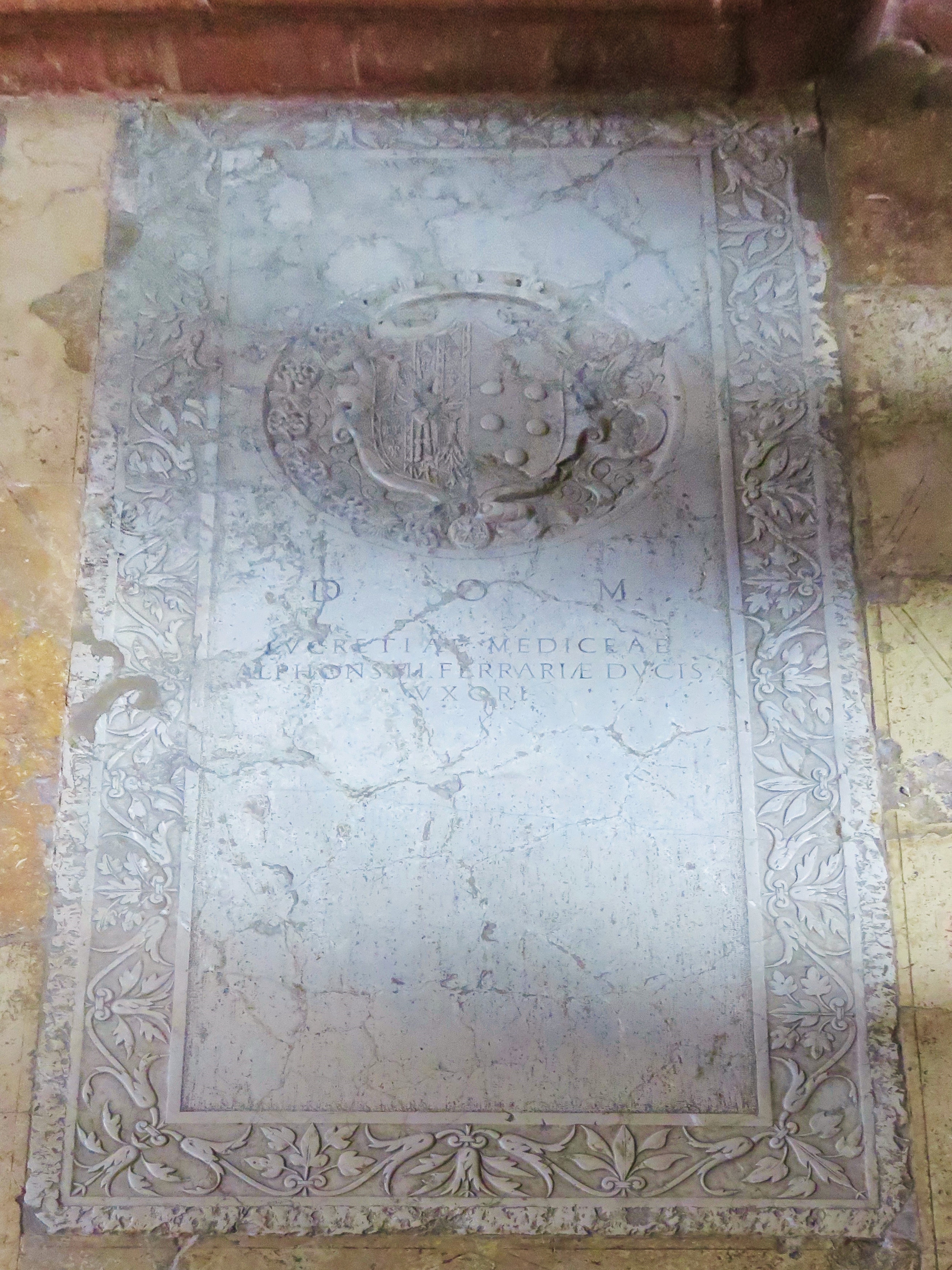 Tombe casata degli Estensi - Lucrezia de' Medici